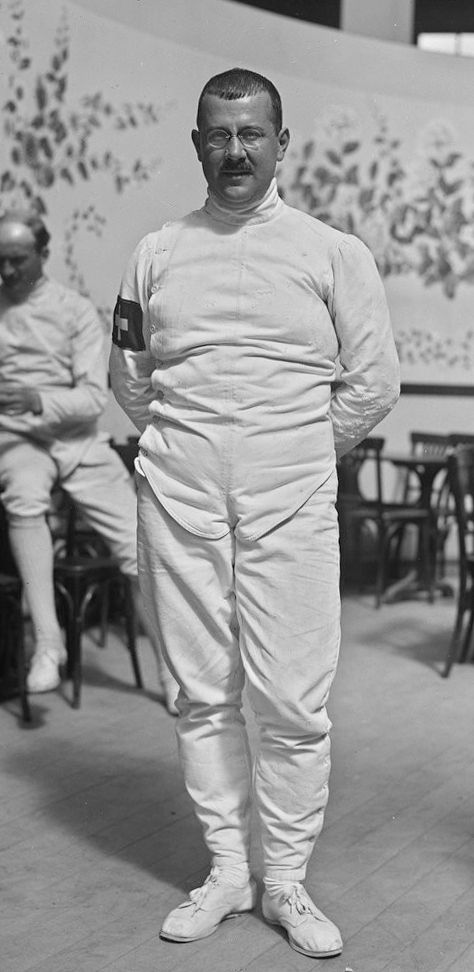 Empeyta, Suisse [escrimeur, Luna Park, championnat d'Europe d'escrime, 16-17 juin 1922] : [photographie de presse] / [Agence Rol]